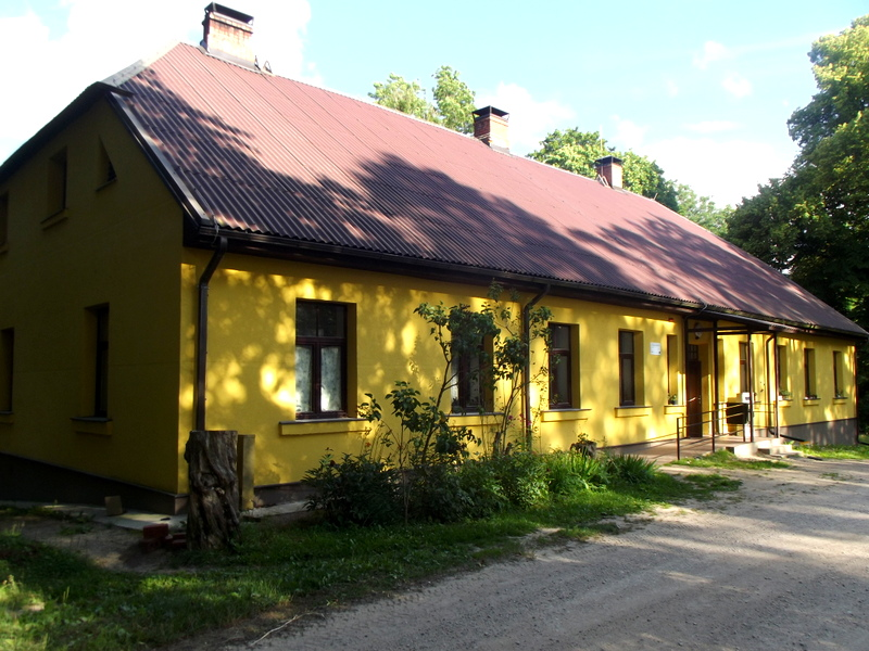 Mazīvandes muiža